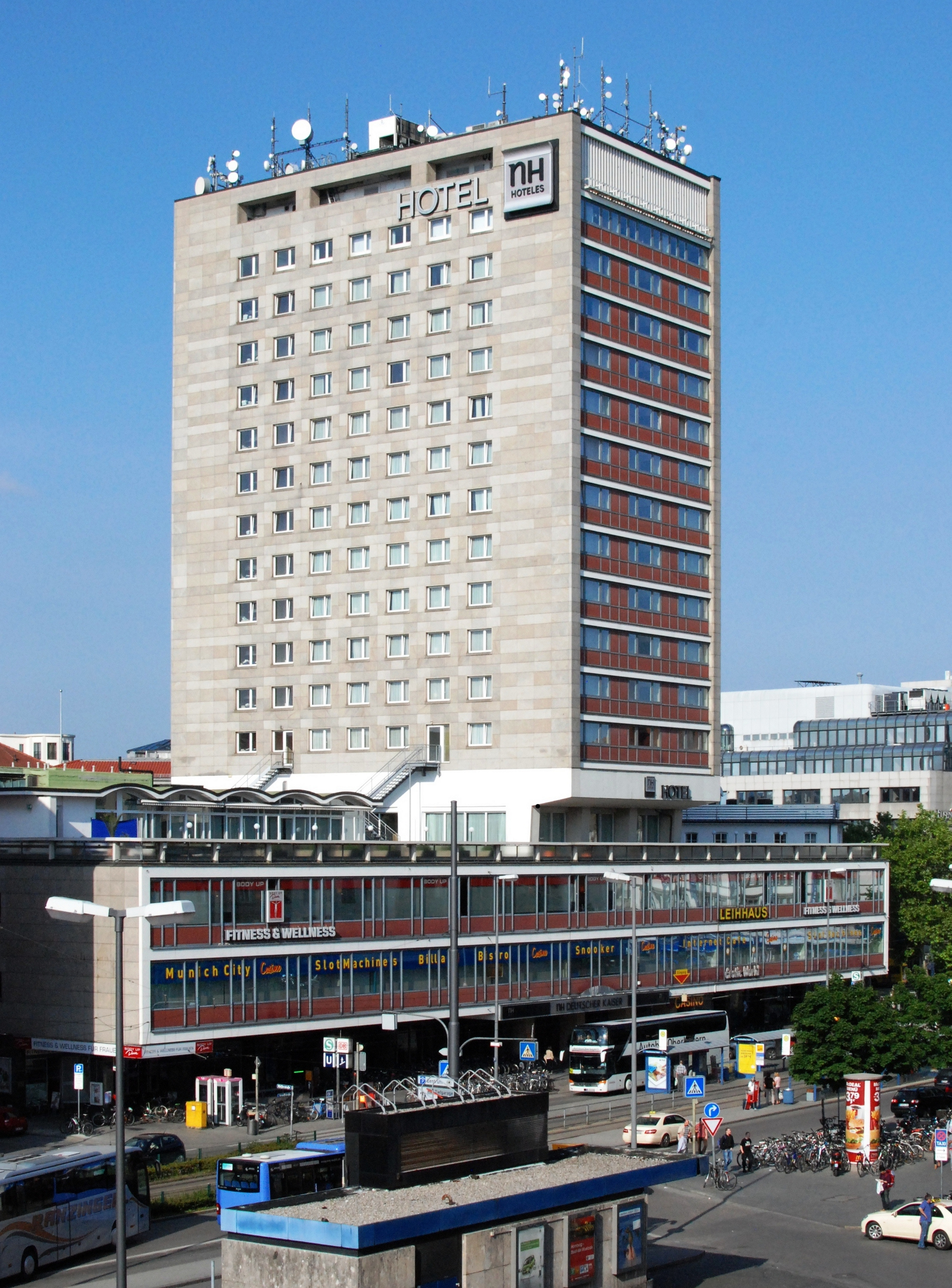 Hotel Deutscher Kaiser in der Arnulfstraße in Maxvorstadt, Stadt München, Regierungsbezirk Oberbayern, Bayern. Erbaut 1958/1960, Architekt Hans Knapp-Schachleitner.